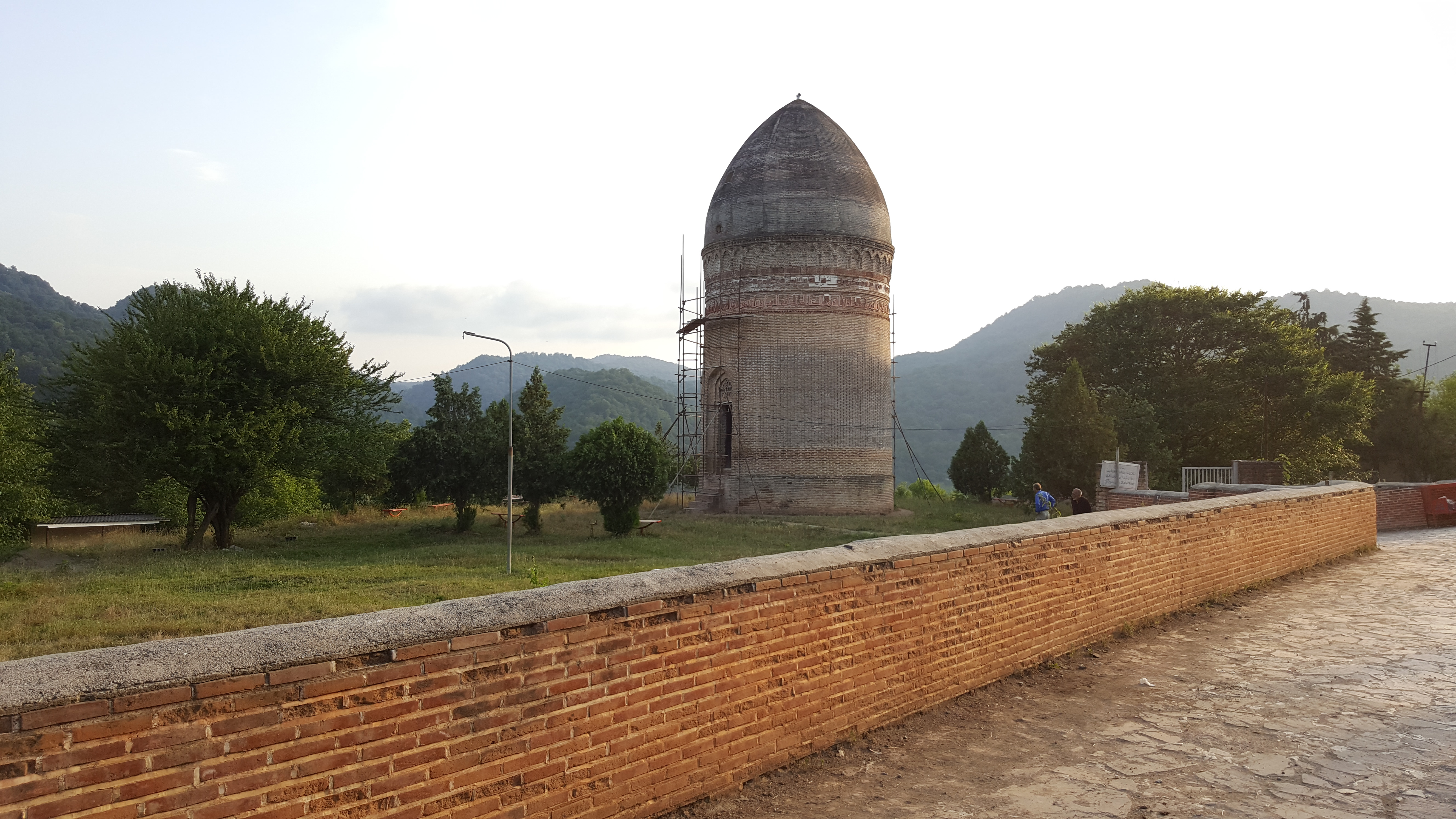 برج لاجیم